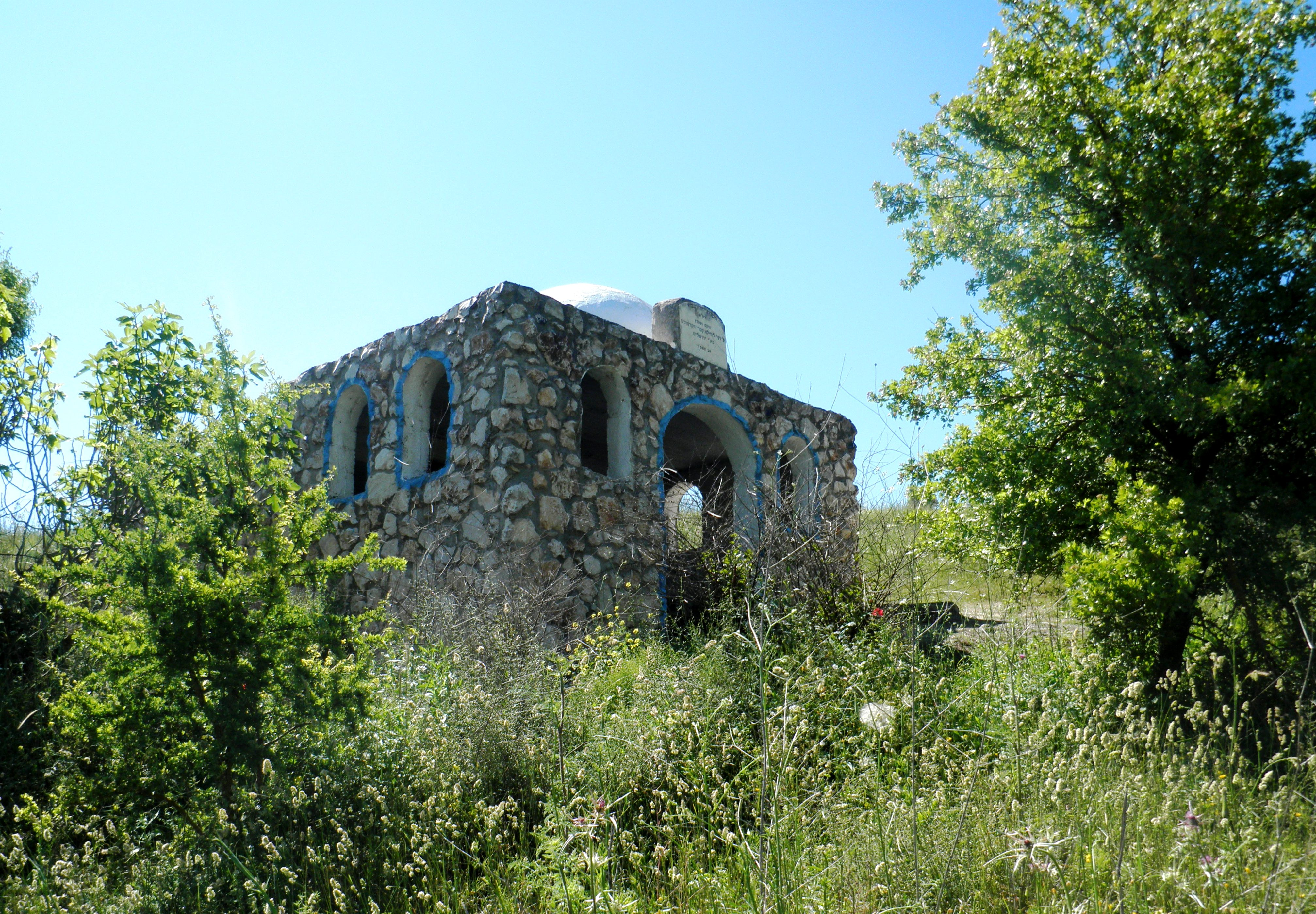 קבר יואל הנביא